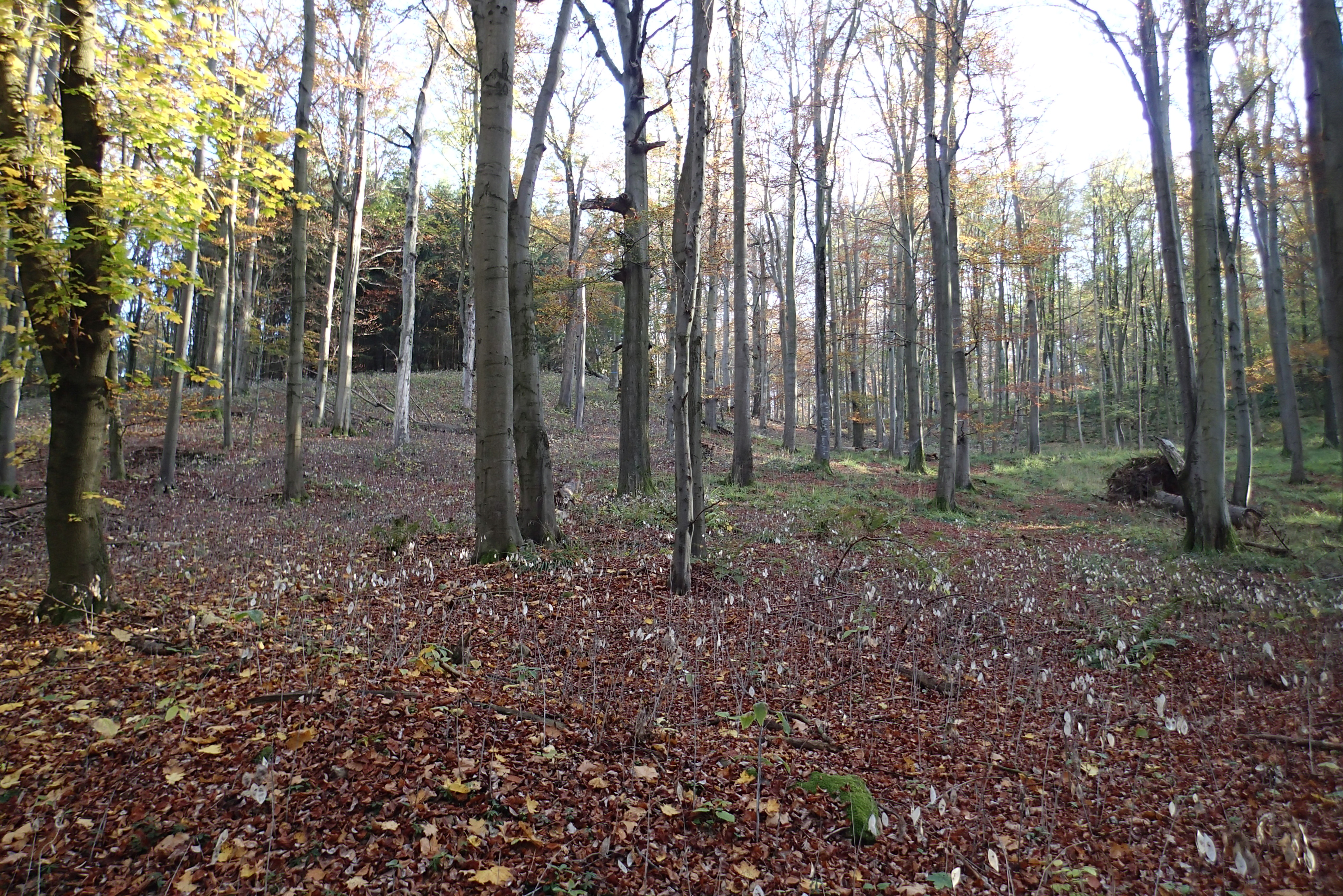 Porost měsíčnice vytrvalé na Kokšíně